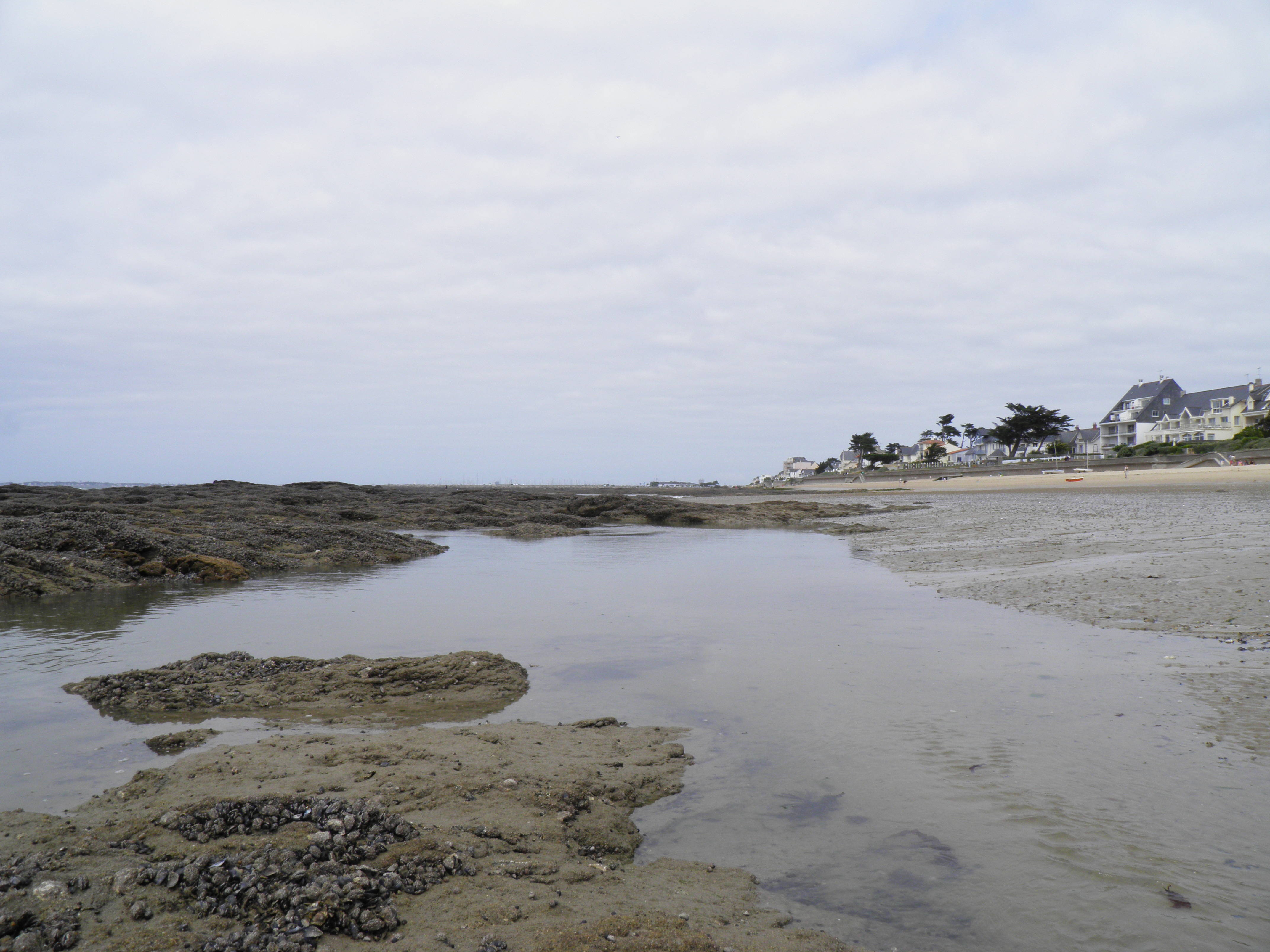 Plage à Pornichet (Loire-Atlantique, France).